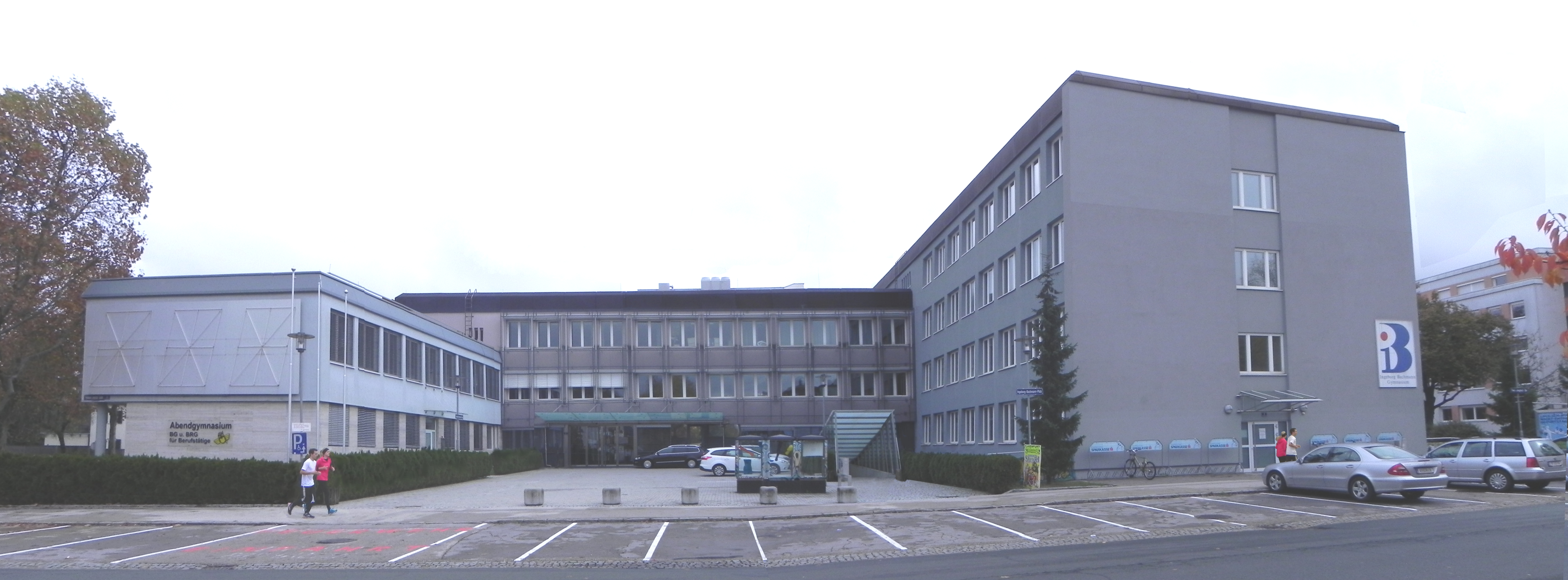 Panorama-Ansicht aus Richtung West